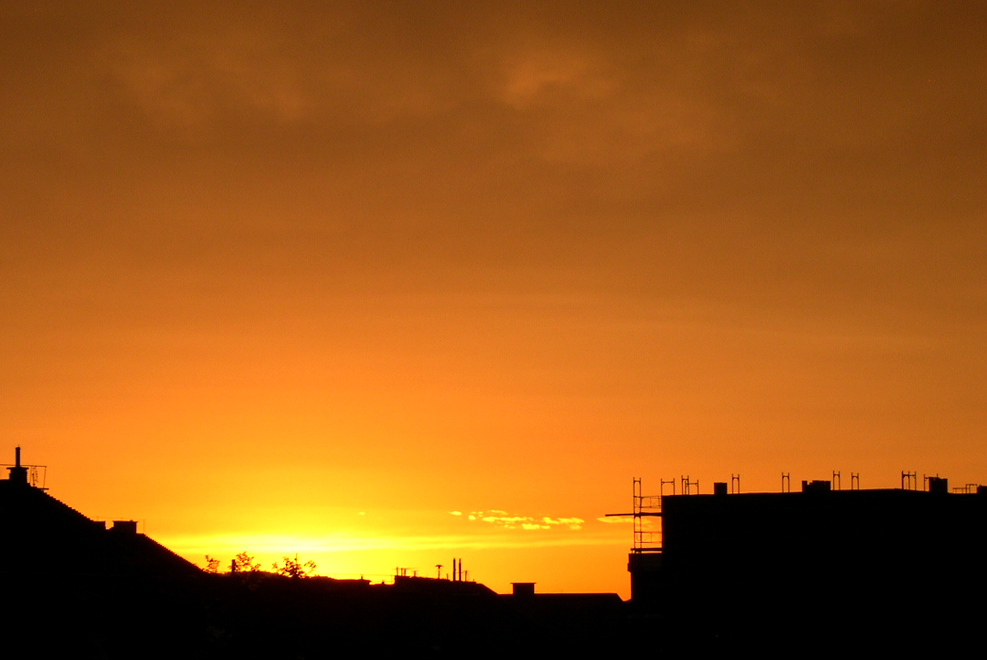 Budapest, Józsefváros